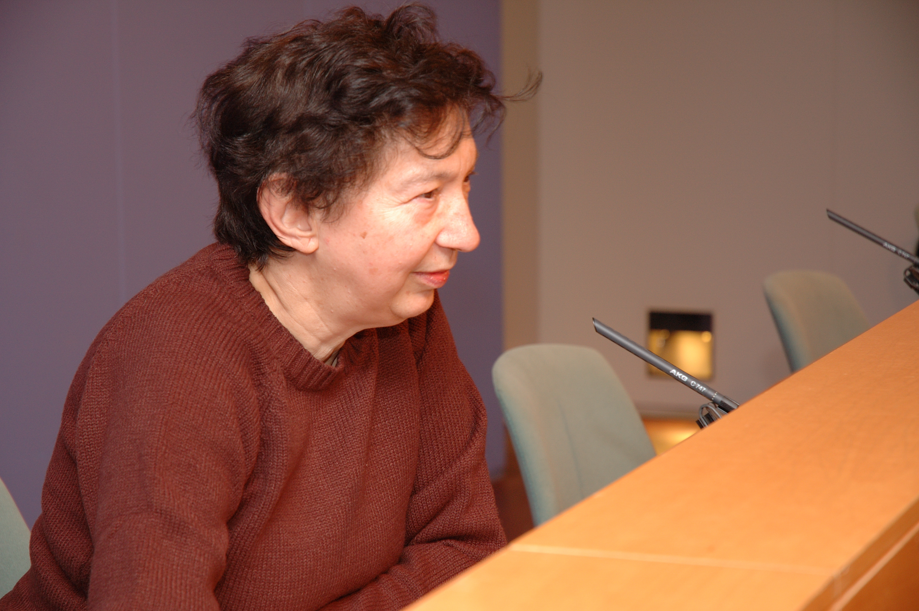 Eva Serra al MHC el 2004.